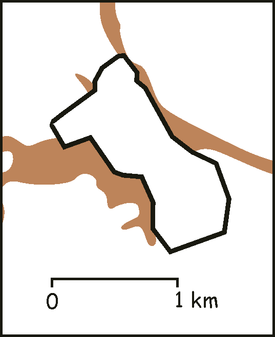 Utilisateur:Laurent Deschodt Summary position approximative de l'enceinte médiévale de Lille